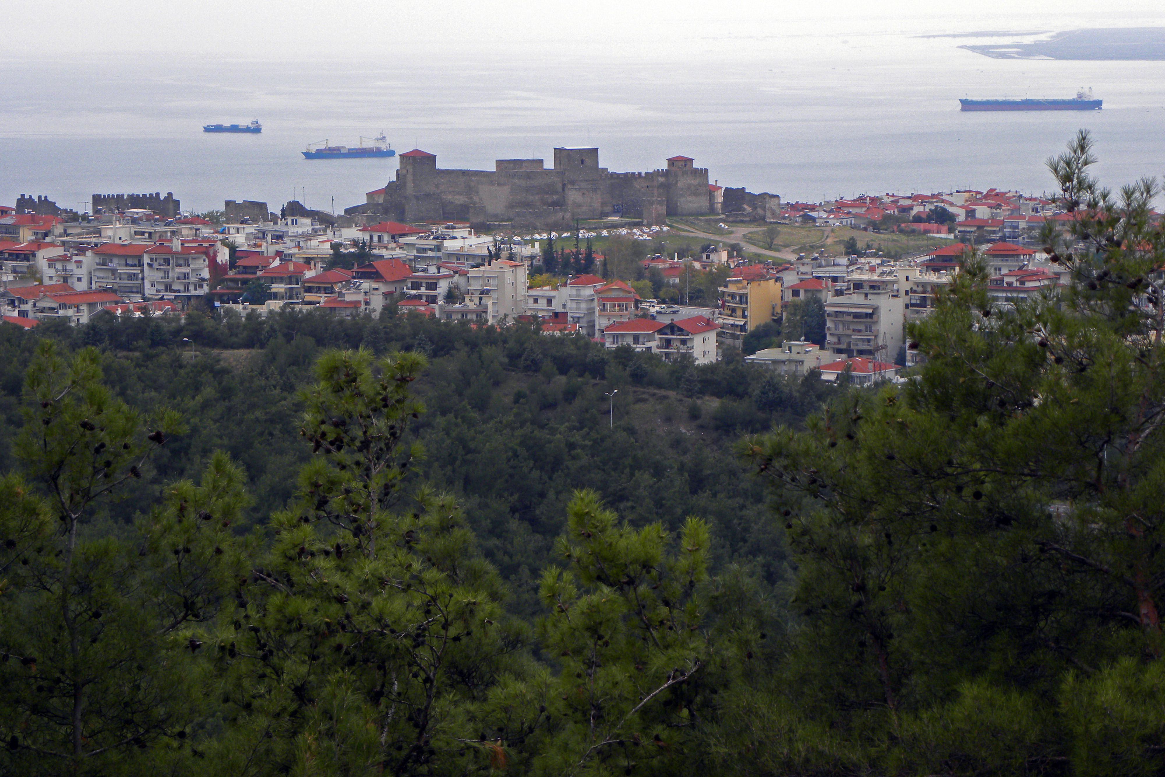 Επταπύργιο